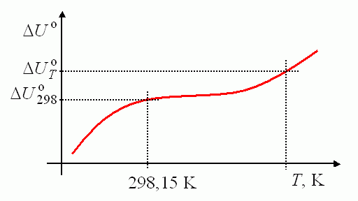 Internal energy